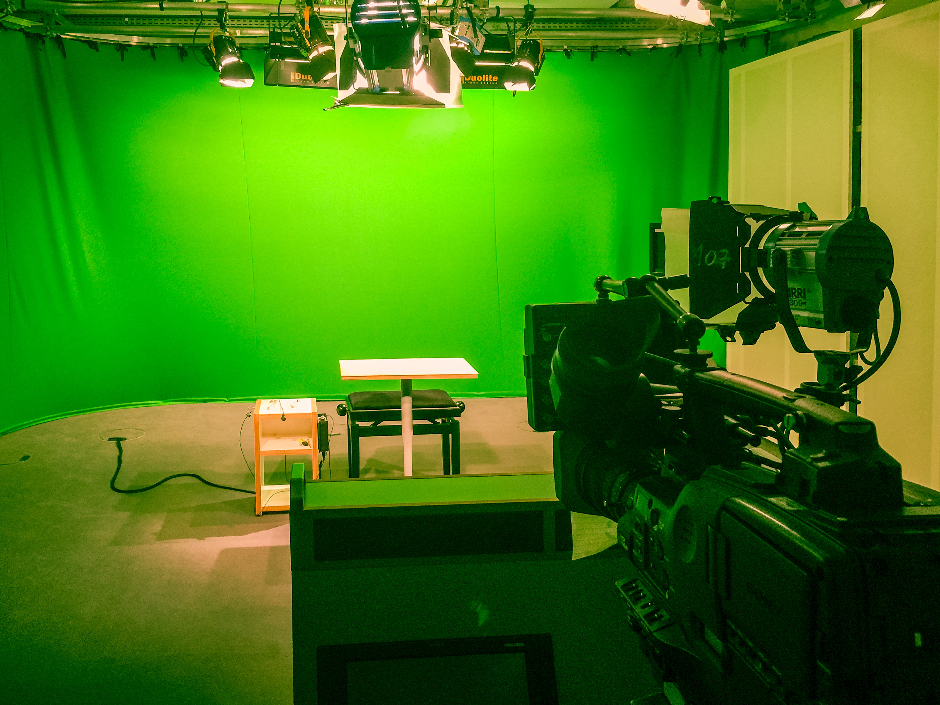 Greenscren im TV–Studio